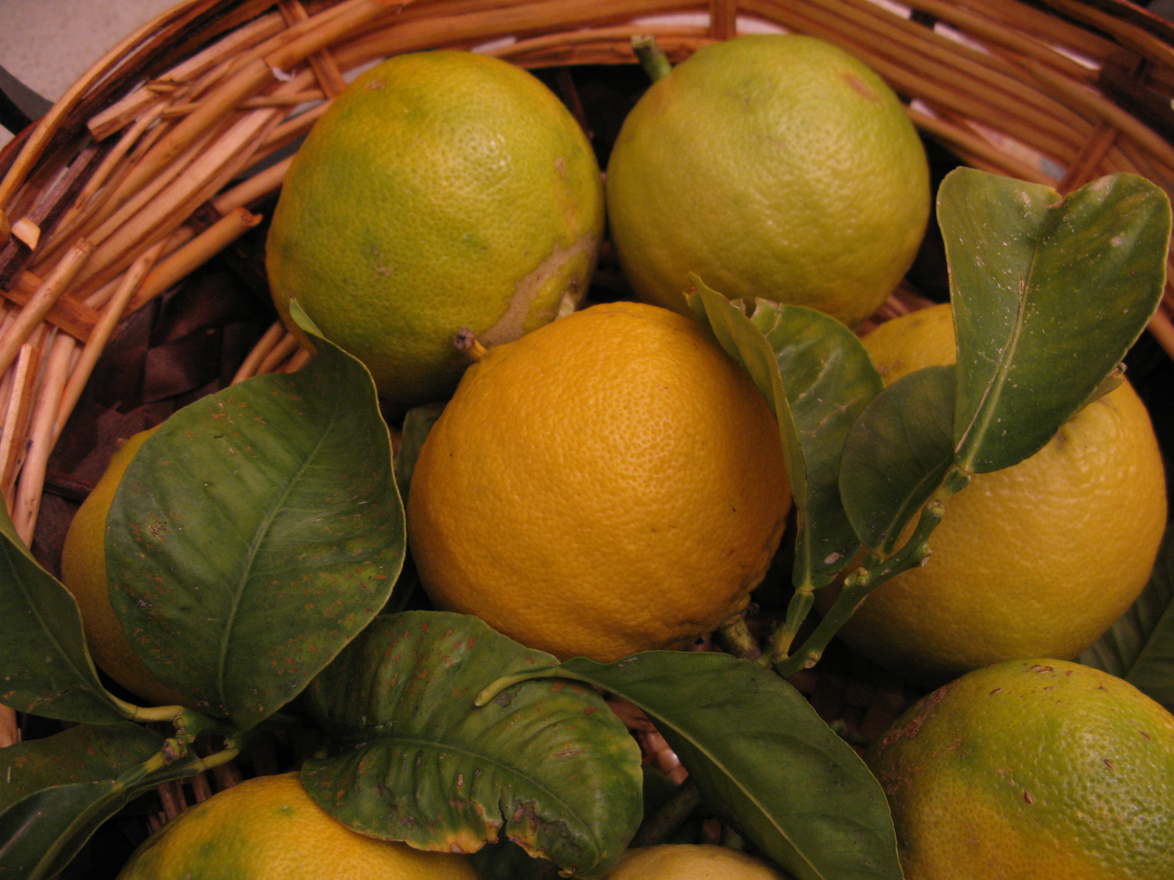 Bergamotti